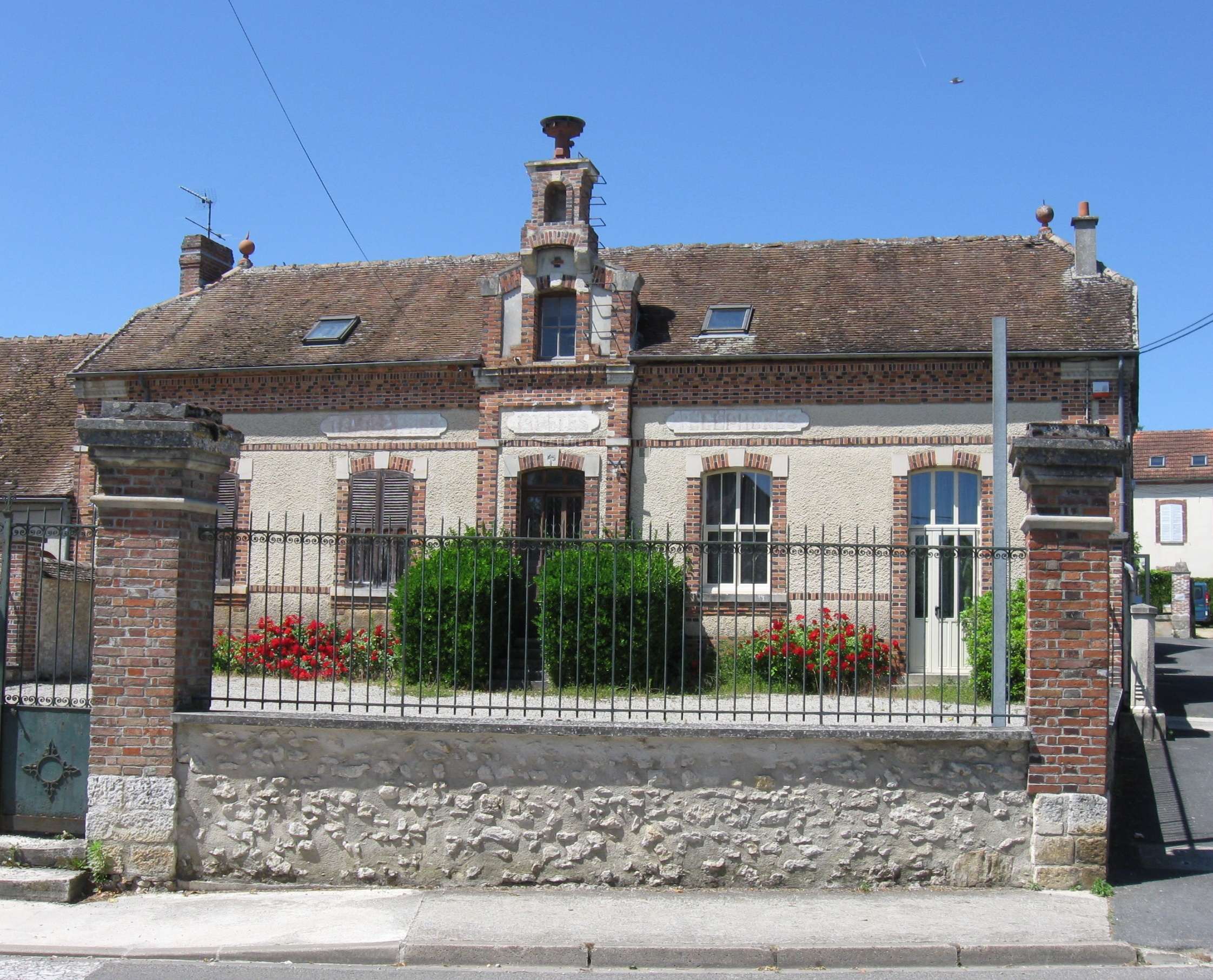 L'ancienne poste d'Everly; initialement bâtiment de l'école des filles. (Seine-et-Marne, région Île-de-France).